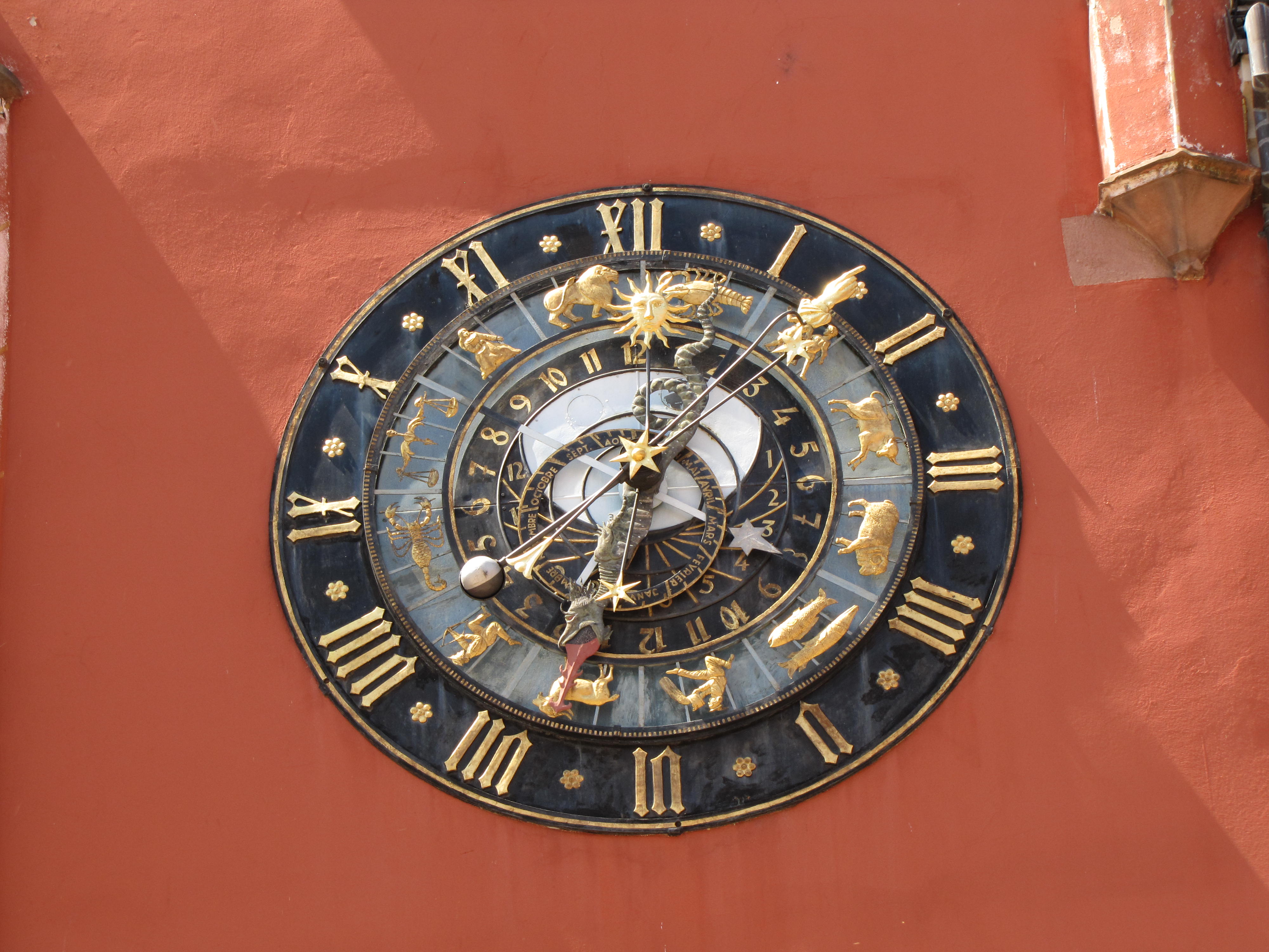 Alsace, Bas-Rhin, Haguenau, Ancienne Chancellerie (1484), puis Musée alsacien, place Joseph Thierry: Horloge d'édifice (horloge à astrolabe, horloge astronomique) (1904)